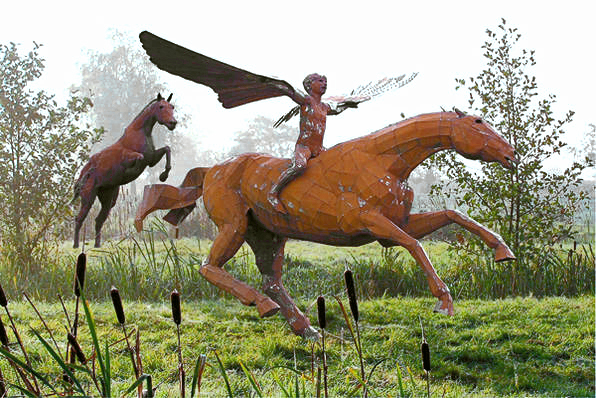 Hommage an den Jockey von Artemision, lebensgroße Stahlplastiken in Nienstedten von Heinrich Eder aus dem Jahr 2007